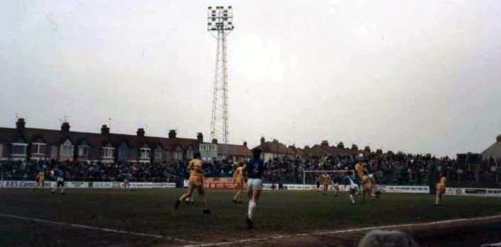 Priestfield Stadium, Gillingham, Kent, England